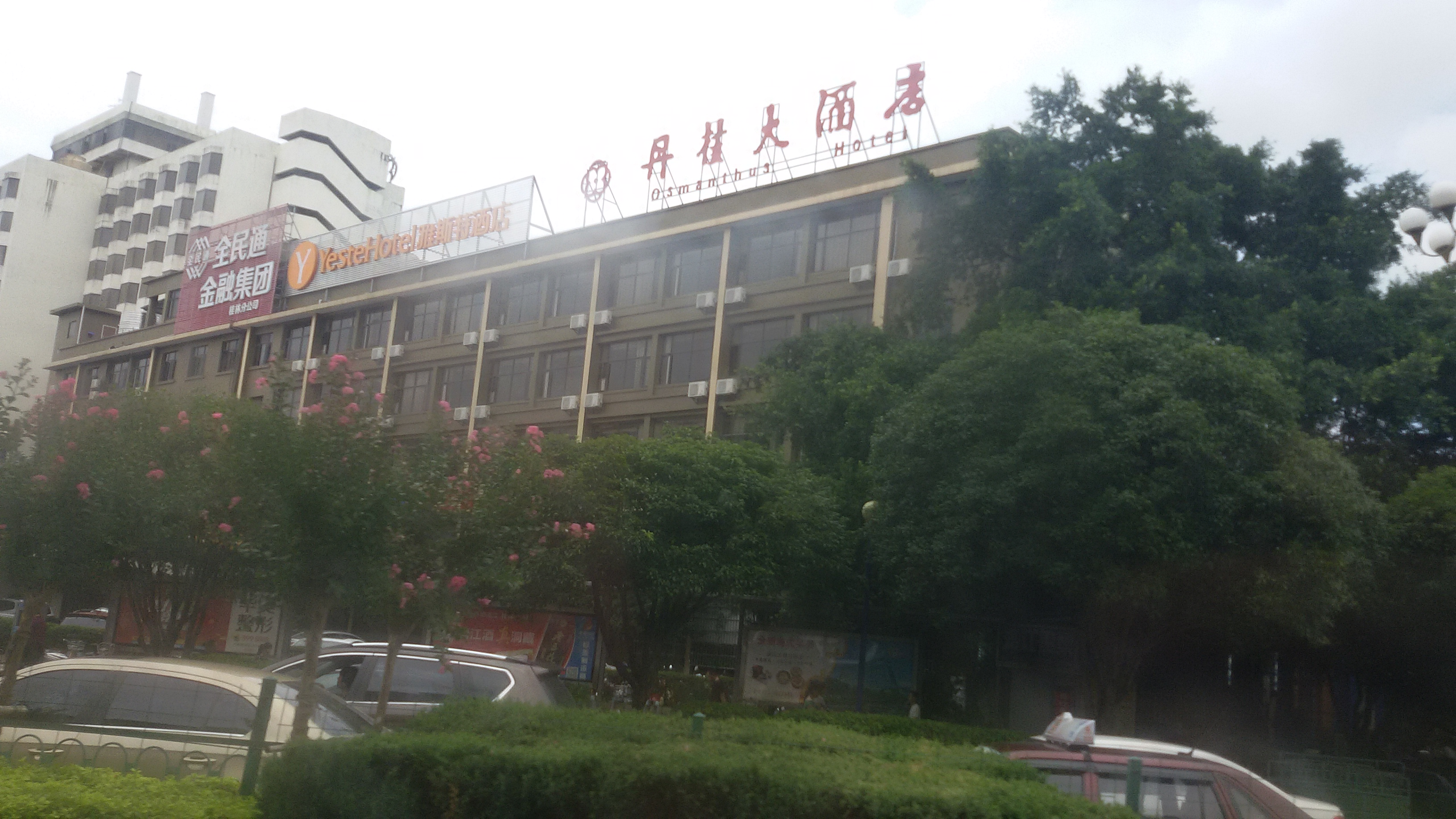 粵語: 丹桂大酒店